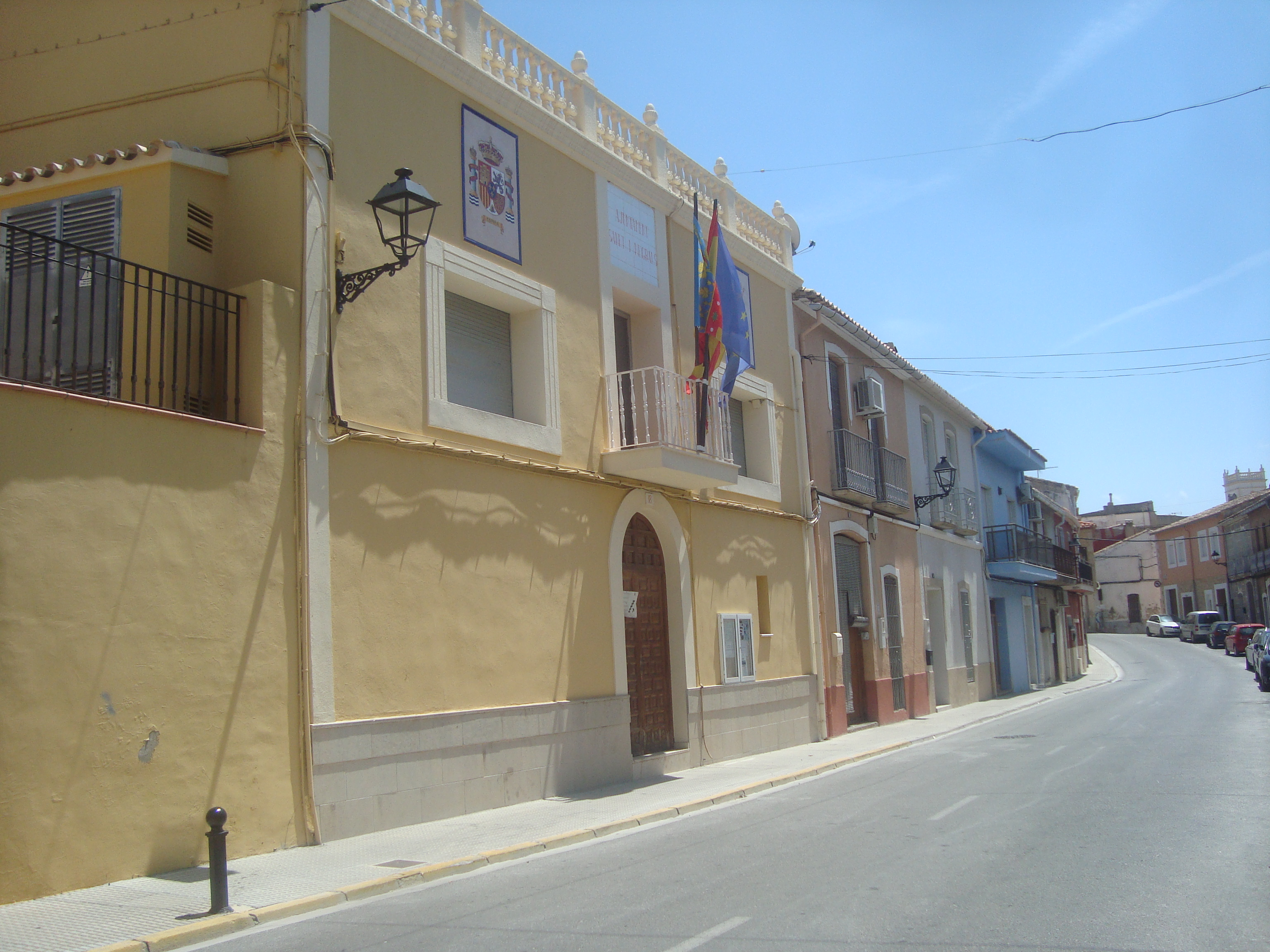 Ajuntament de Sanet i Negrals (Alacant)